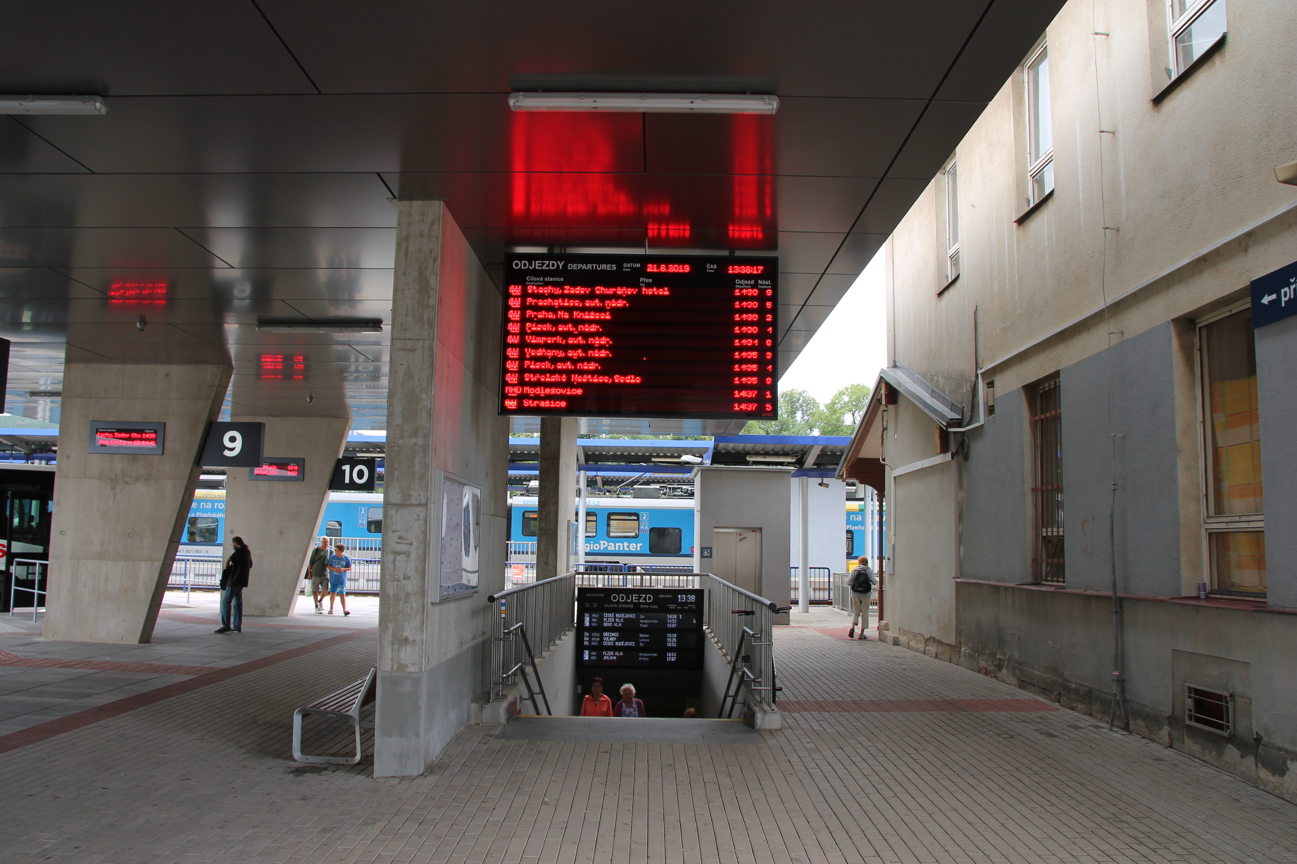 Nové autobusové nádraží ve Strakonicích – v provozu od prosince 2018